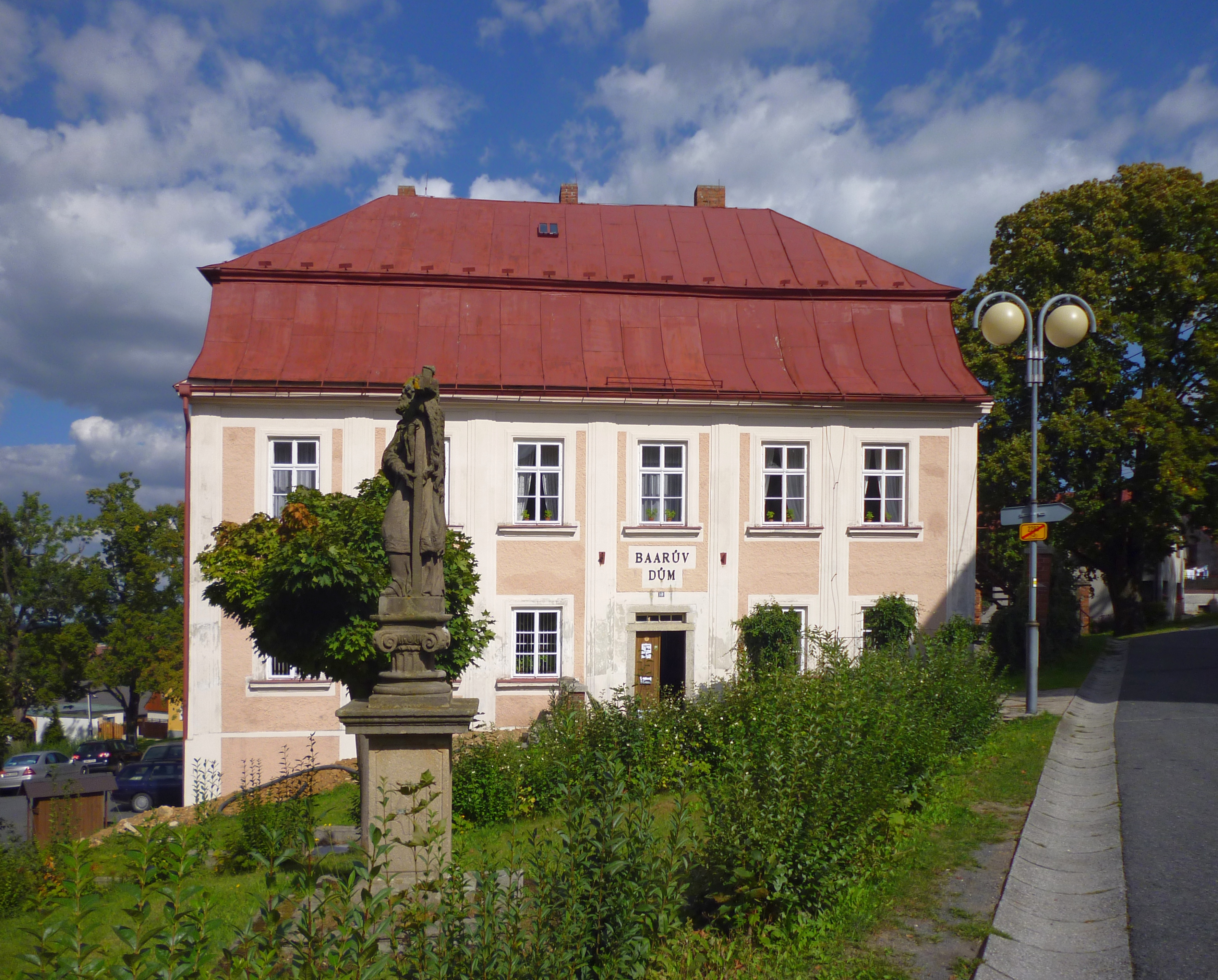 Baarův dům